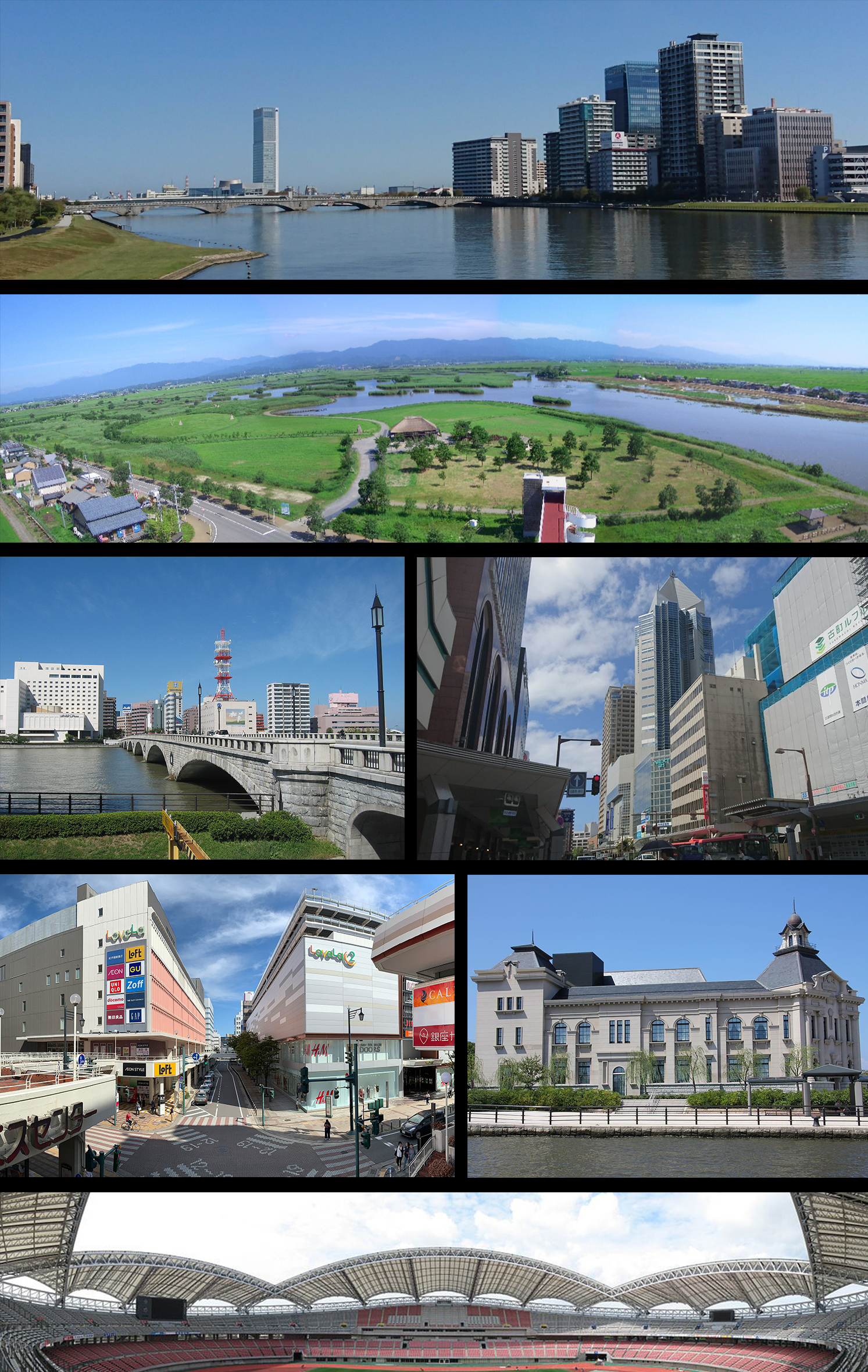 新潟市のモンタージュ画像。